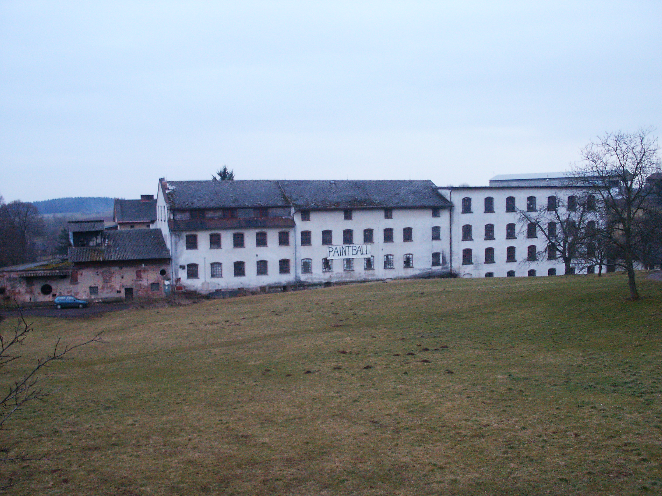 Vidochov - bývalá mechanická tkalcovna bratří Löwenbachů, nyní herna paintballu